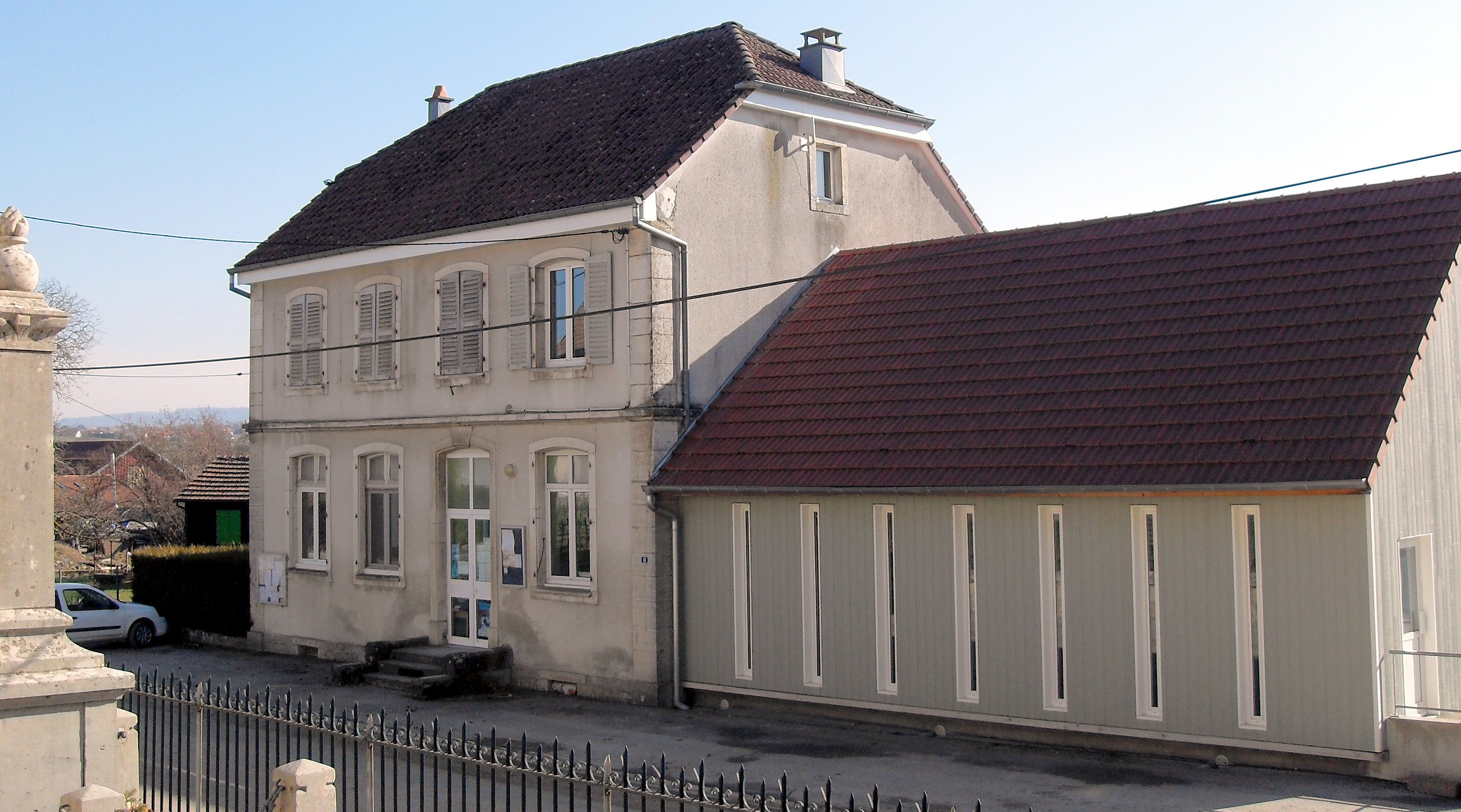 La mairie de Villars-le-Sec